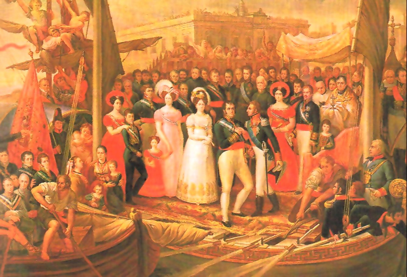 Desembarco de Fernando VII en el Puerto de Santa Maria el 1 de octubre de 1823